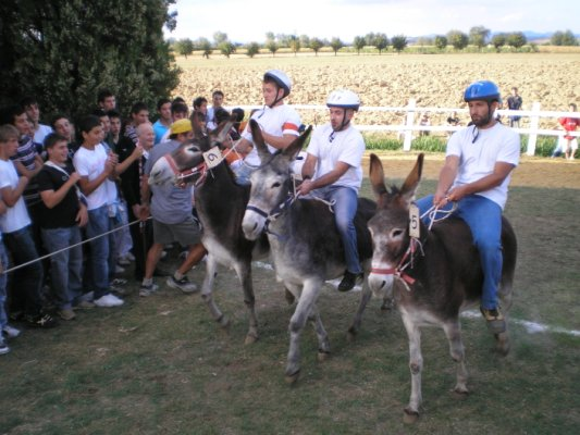 Palio dei Somari 2008 di Montepulciano Stazione (Siena)